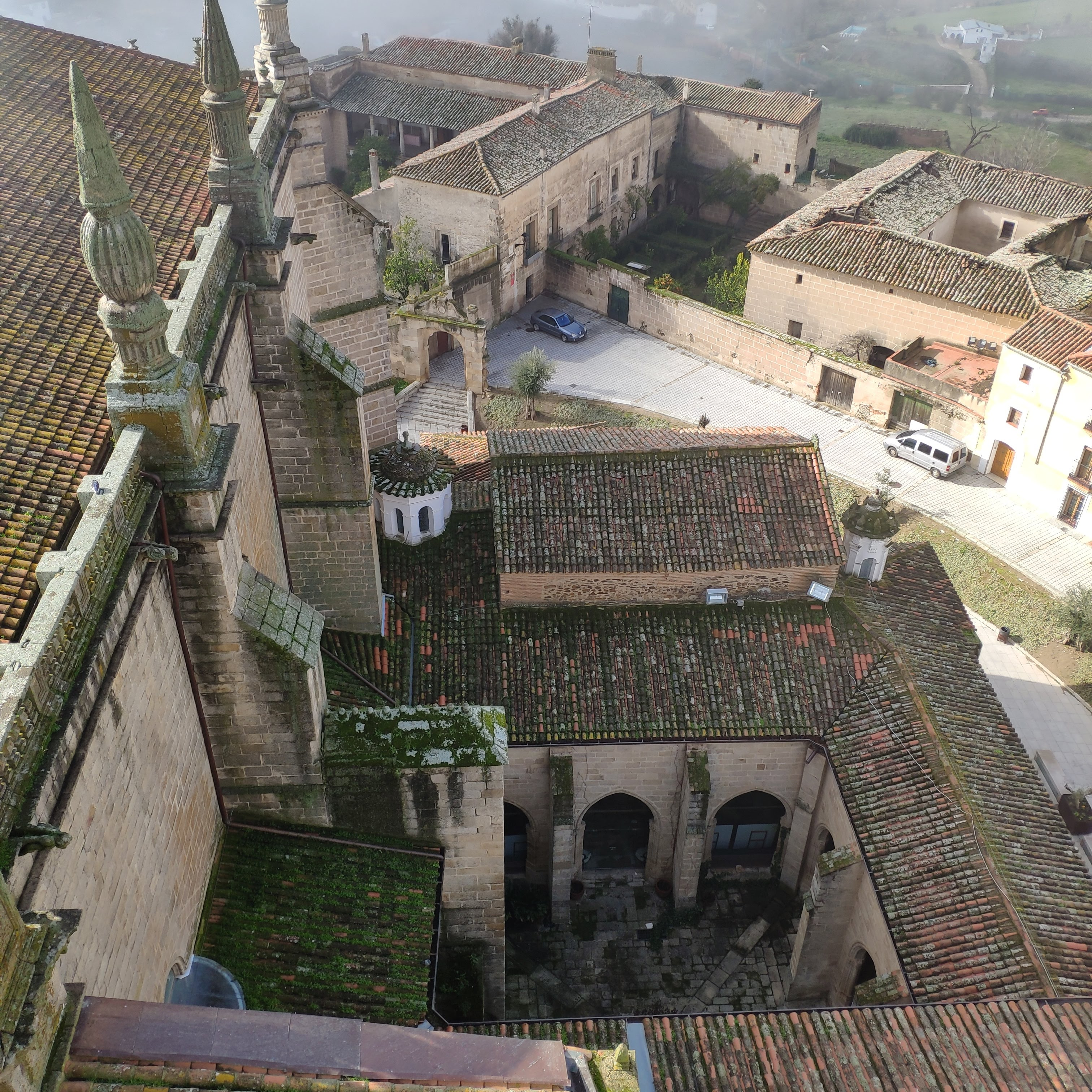 Claustro de la catedral de Coria visto desde el campanario